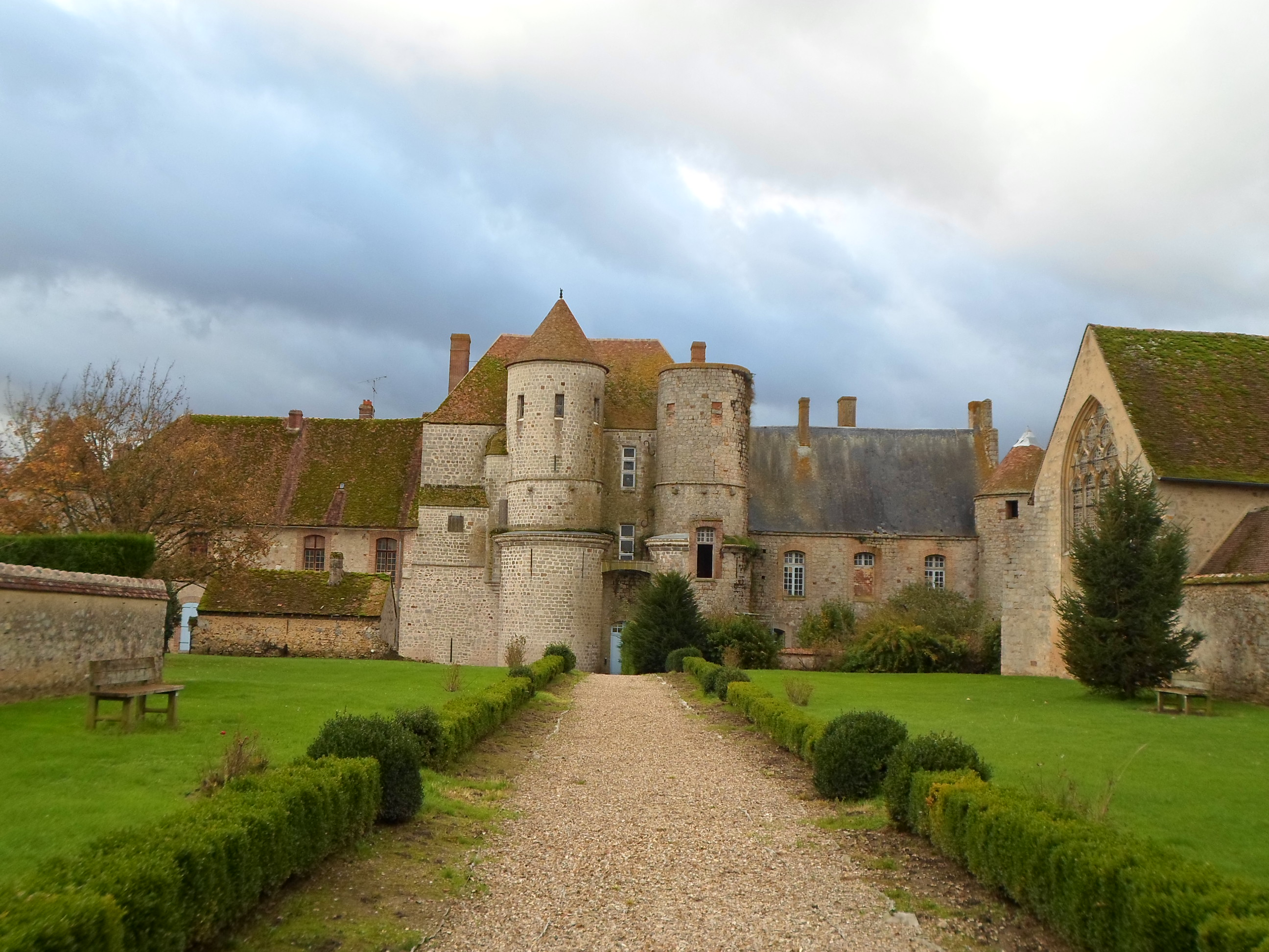 Vue principale du Château de Piffonds (89) France